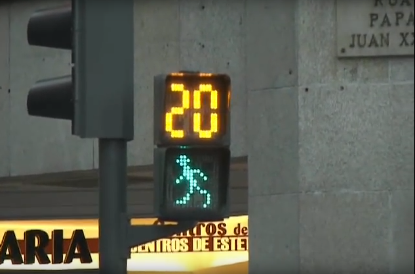 An animated pedestrian signal in Ourense, Spain, photo taken on Oct 08, 2007.